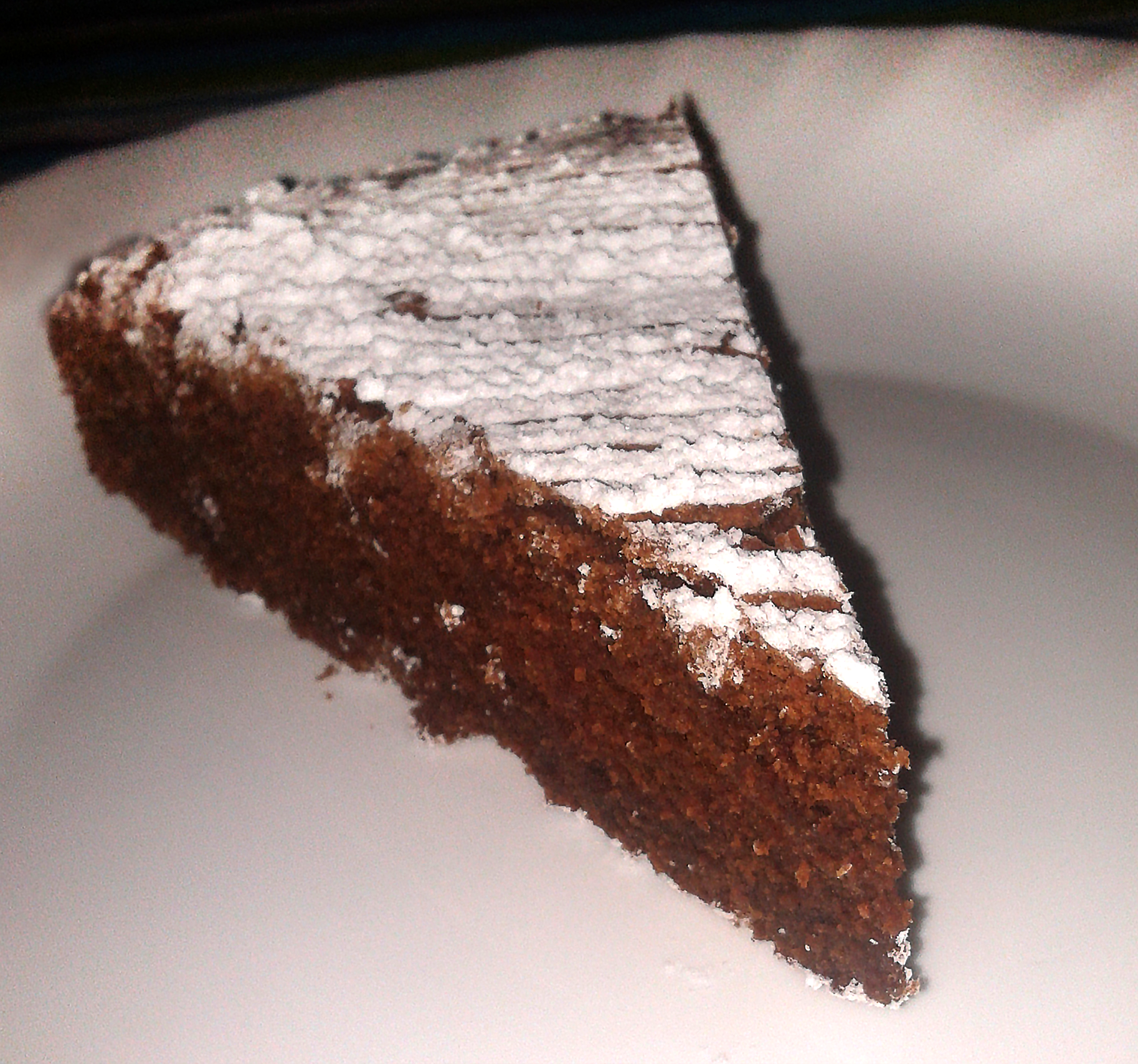 Tenerina ferrarese